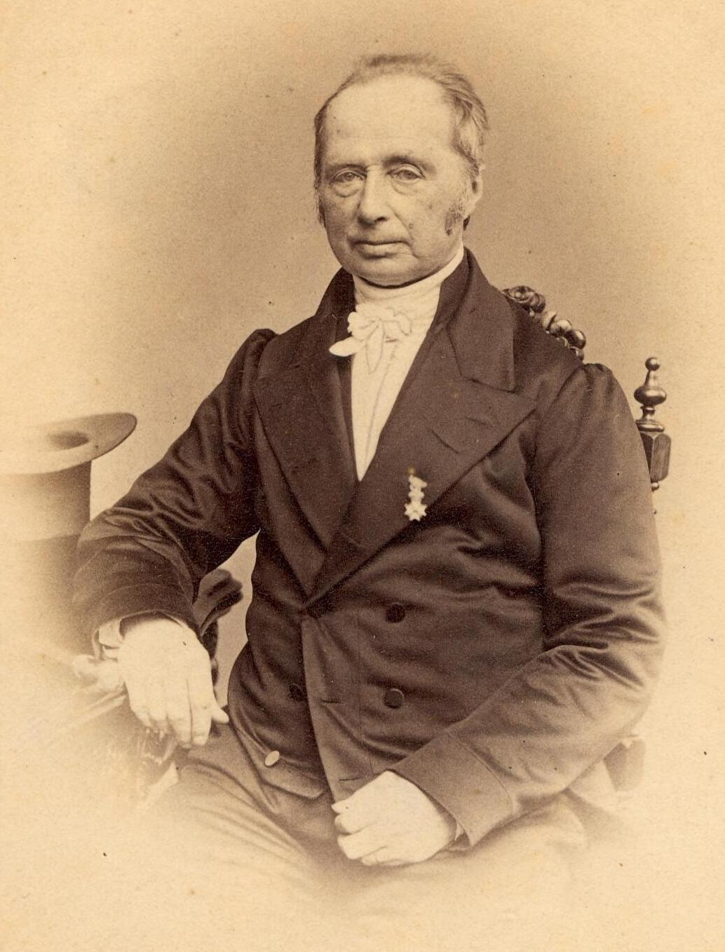 Portret van Wiardus Willem Buma (1802-1873)